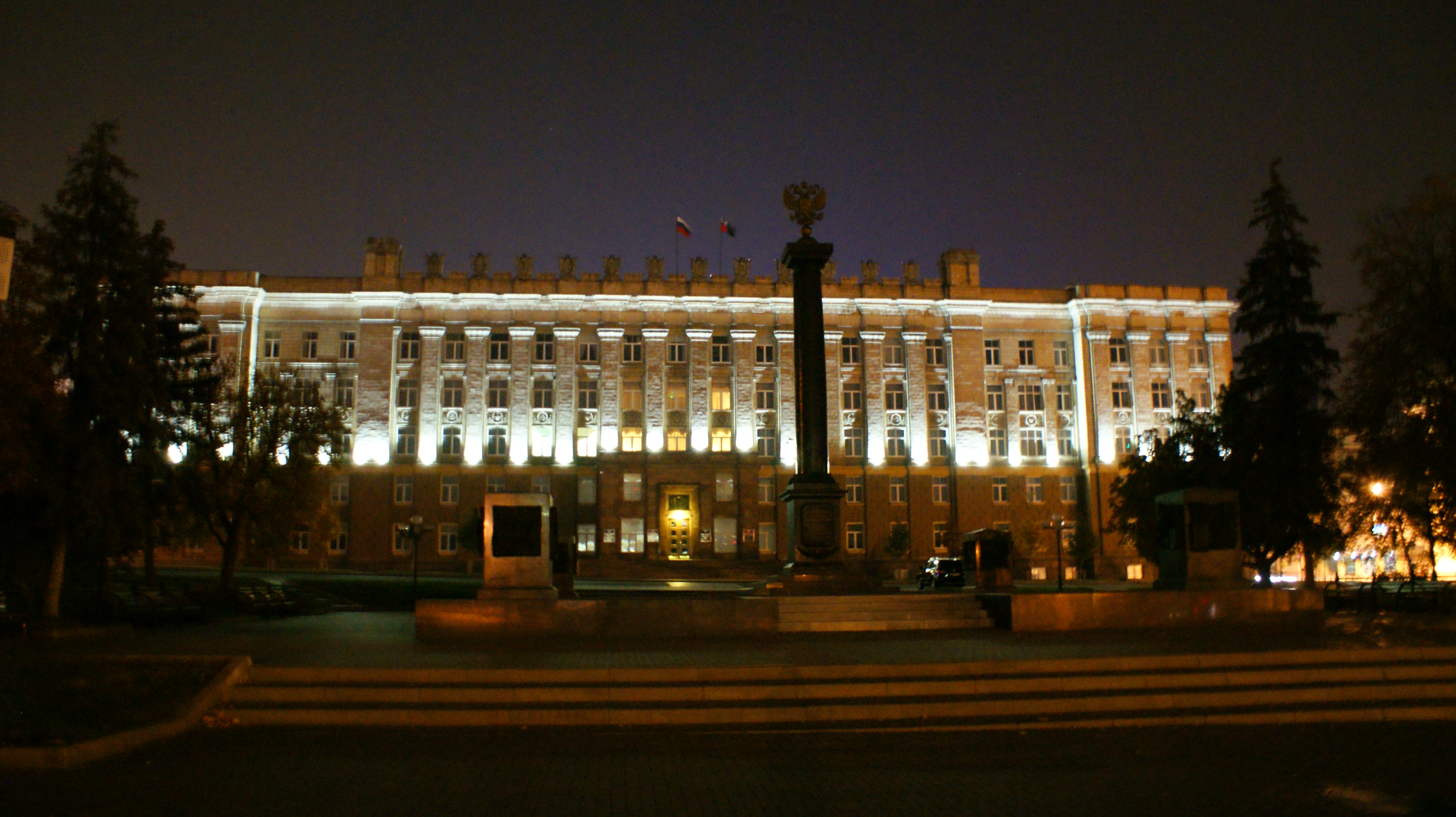 Административное здание (Белгородская область, Белгород, Соборная площадь, 4)